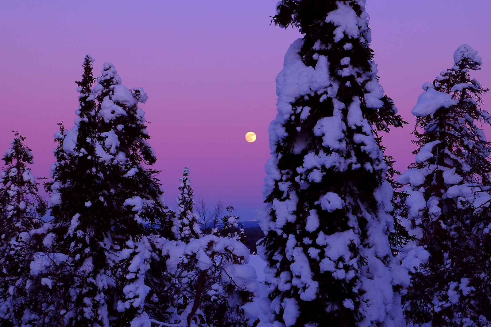 Sunset and moon rise in Ruka, Finland